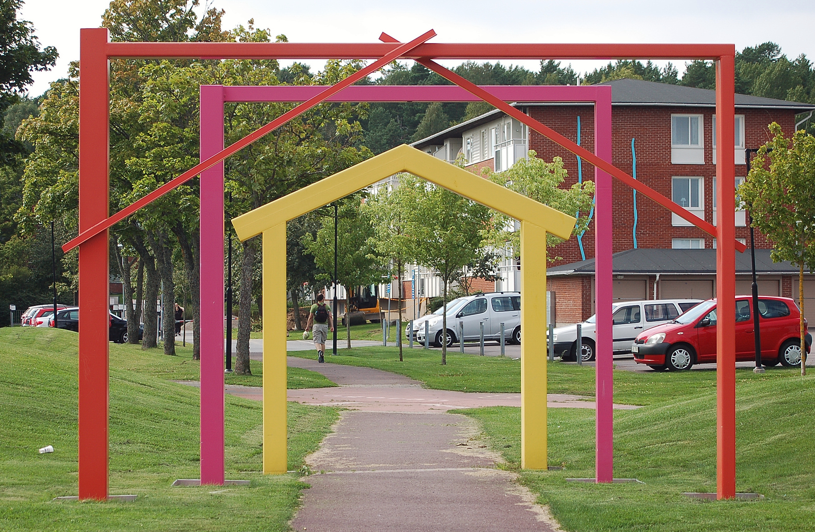 Vägen hem av Anna Kindgren och Carina Gunnars placerade på Hemvägen/Plintgatan Våxnäs, Karlstad.